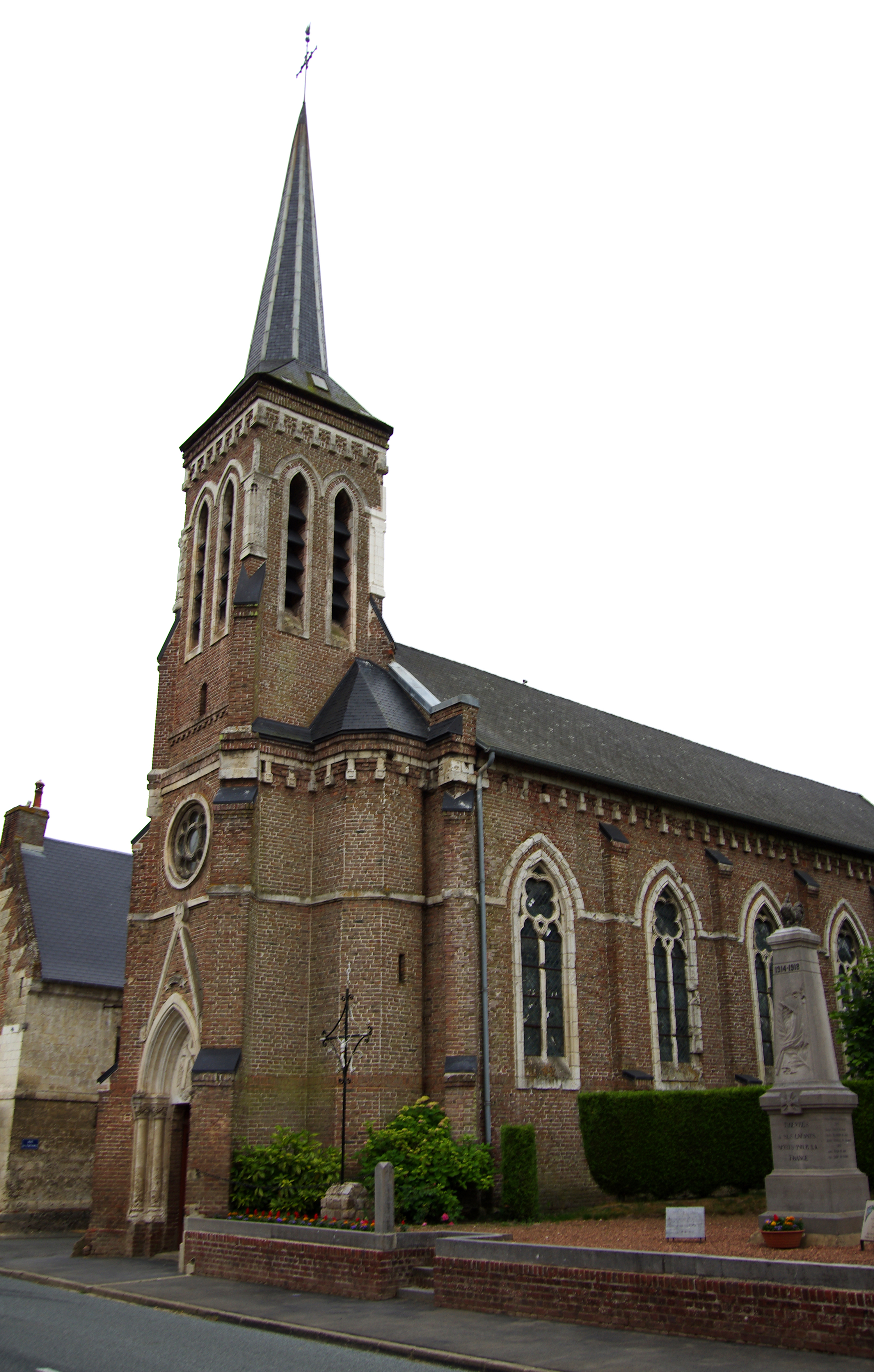 Thièvres (Pas-de-Calais, France) - L'église et le monument-aux-morts. .